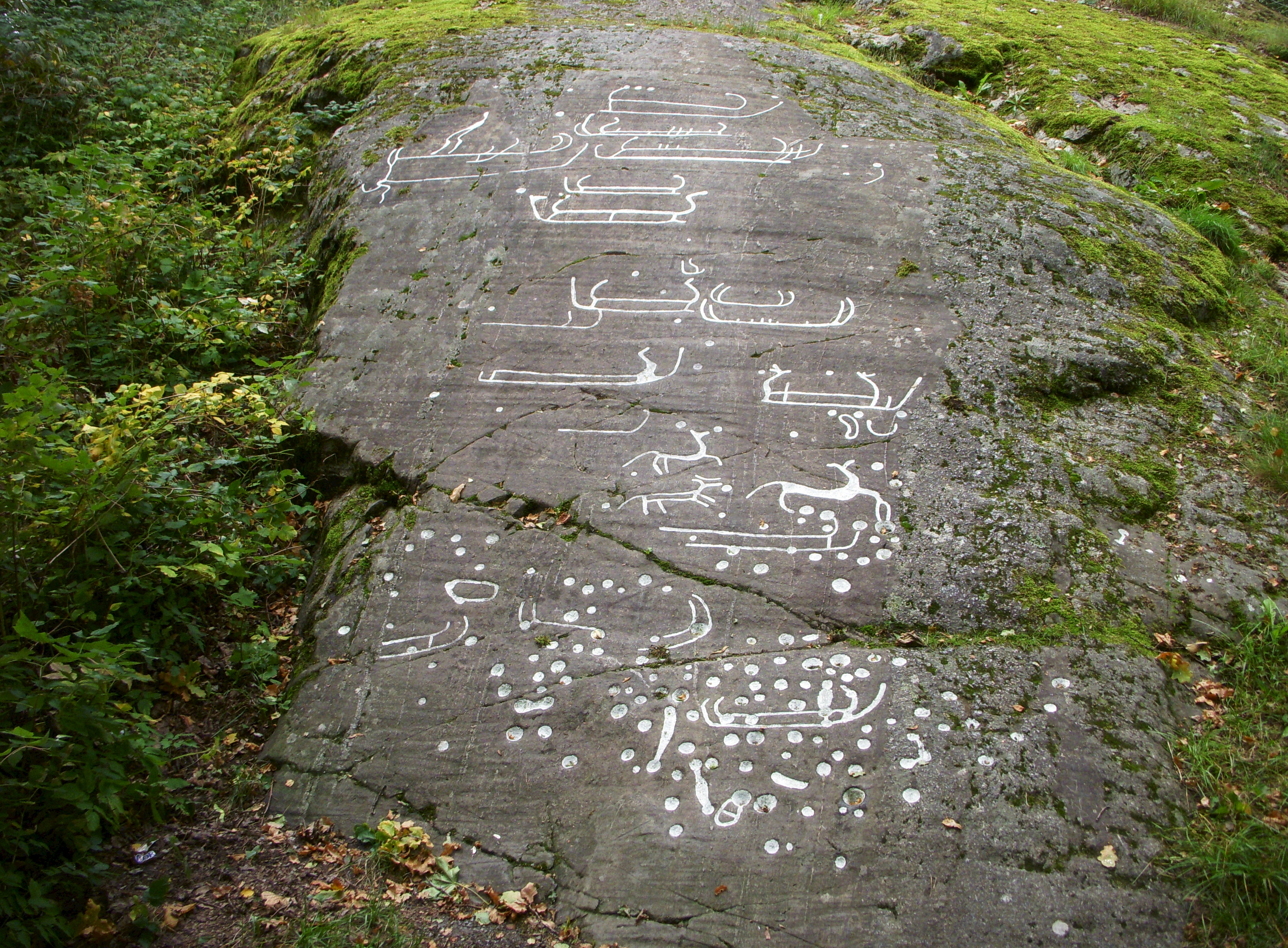 Slagstaristningen med nymålade ristningar